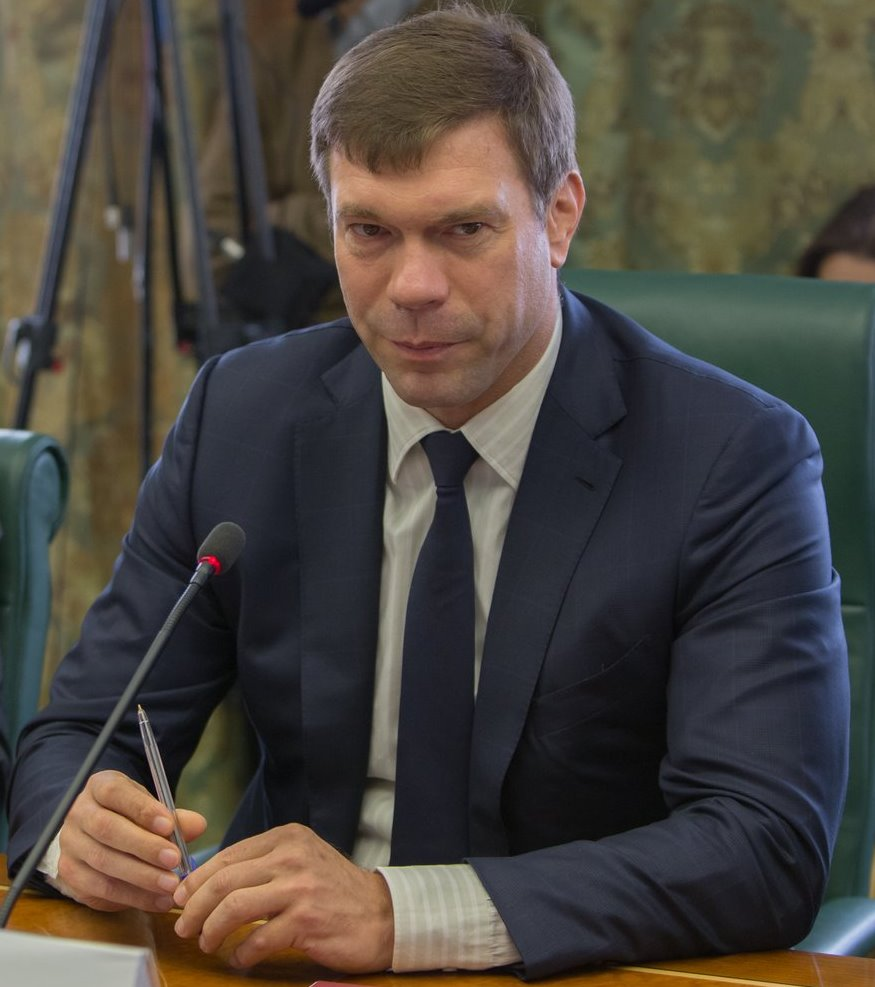 Олег Анатольевич Царёв (род.1970) — украинский политический деятель